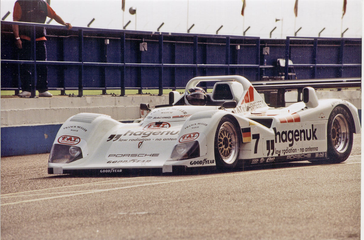 Stefan Johansson Joest Porsche WSC95 Donnington 6/7/1997